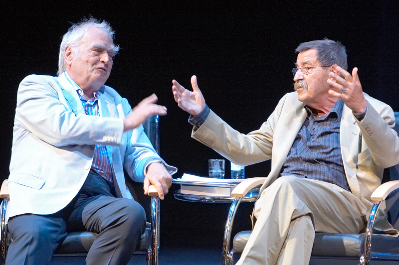 Literarisches Gipfeltreffen: Gruppe 47 – sechzig Jahre danach Günter Grass, Joachim Kaiser und Martin Walser im Gespräch mit Wolfgang Herles 15. Juni 2007, 20 Uhr auf dem Blauen Sofa im Berliner Ensemble